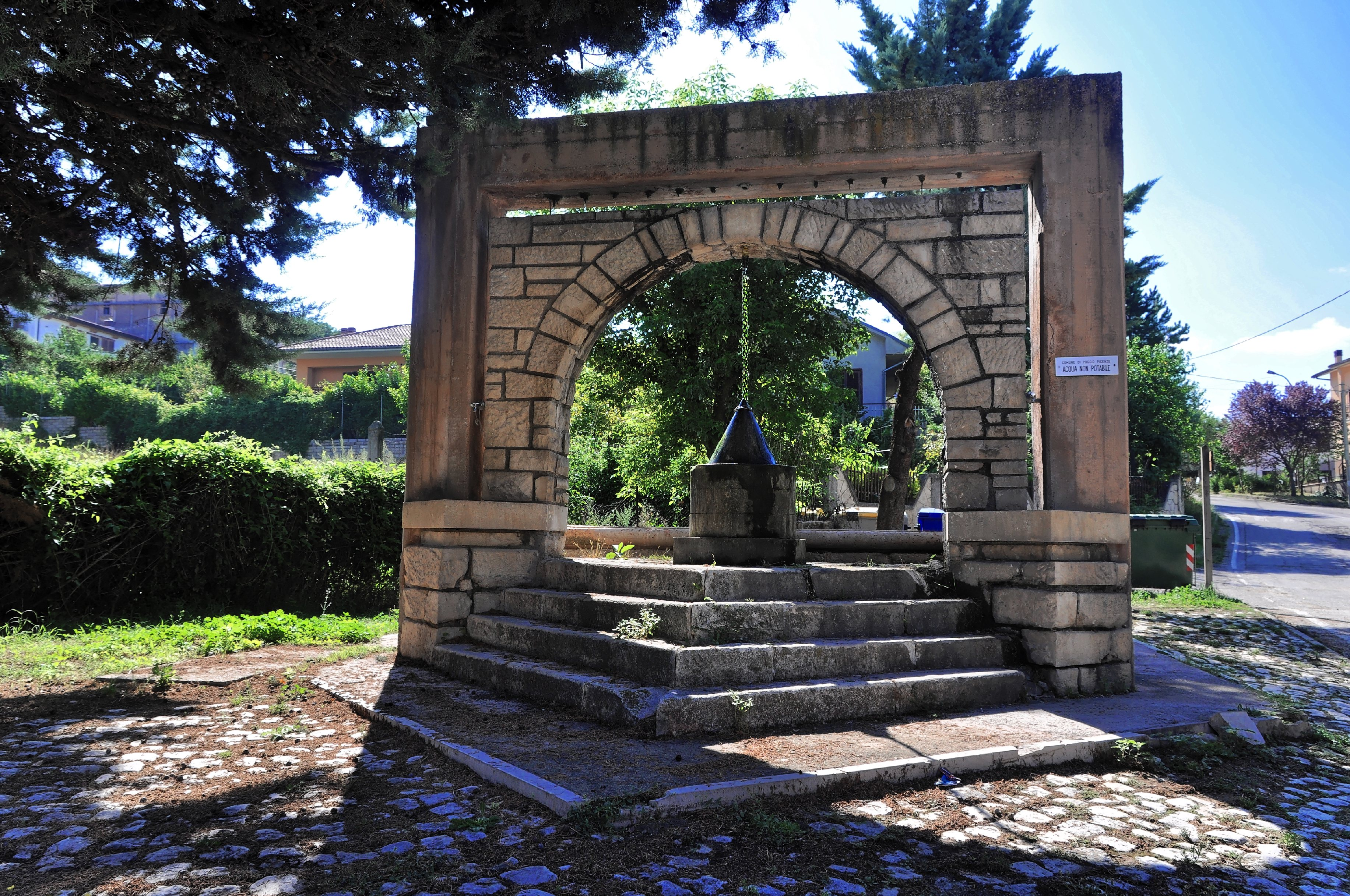 Poggio Picenze 2017